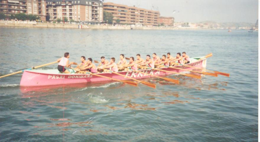 Erreka trainerua Sestaoko banderan.